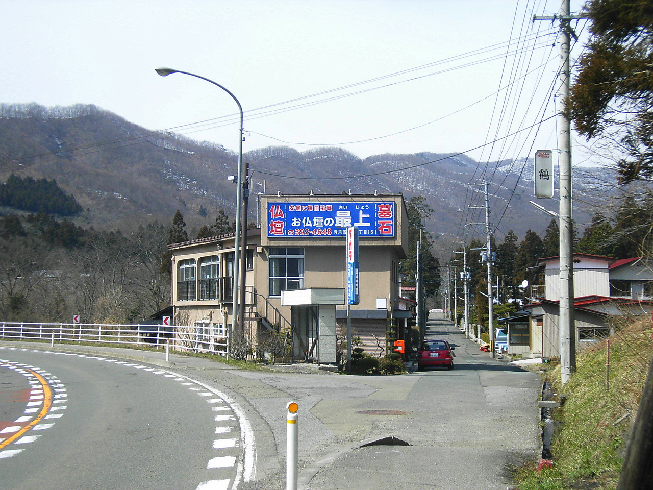 Sakunami Shuku. Sendai, Miyagi prefecture, Japan.